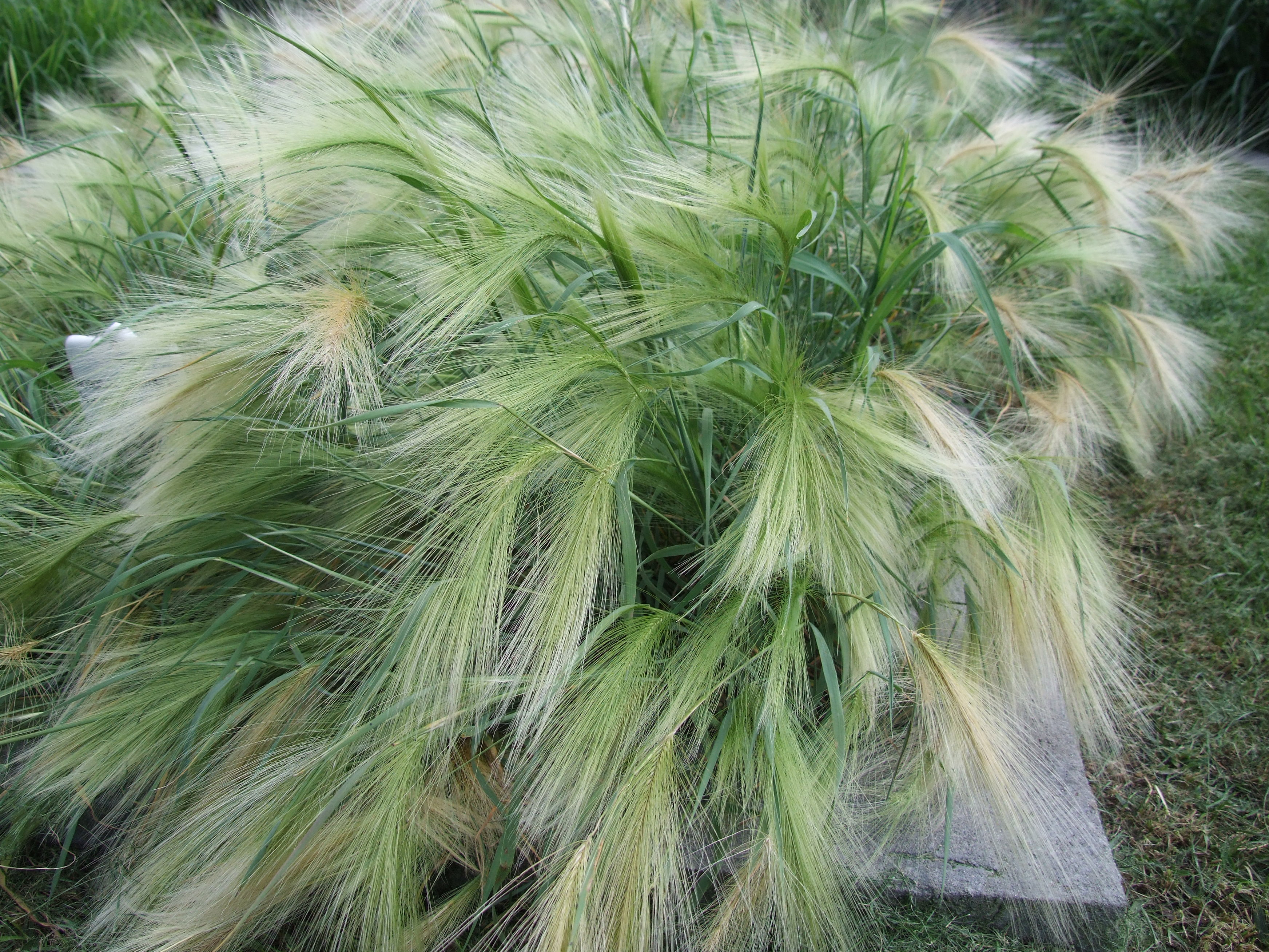 Hordeum_jubatum (pl. jęczmień grzywiasty)